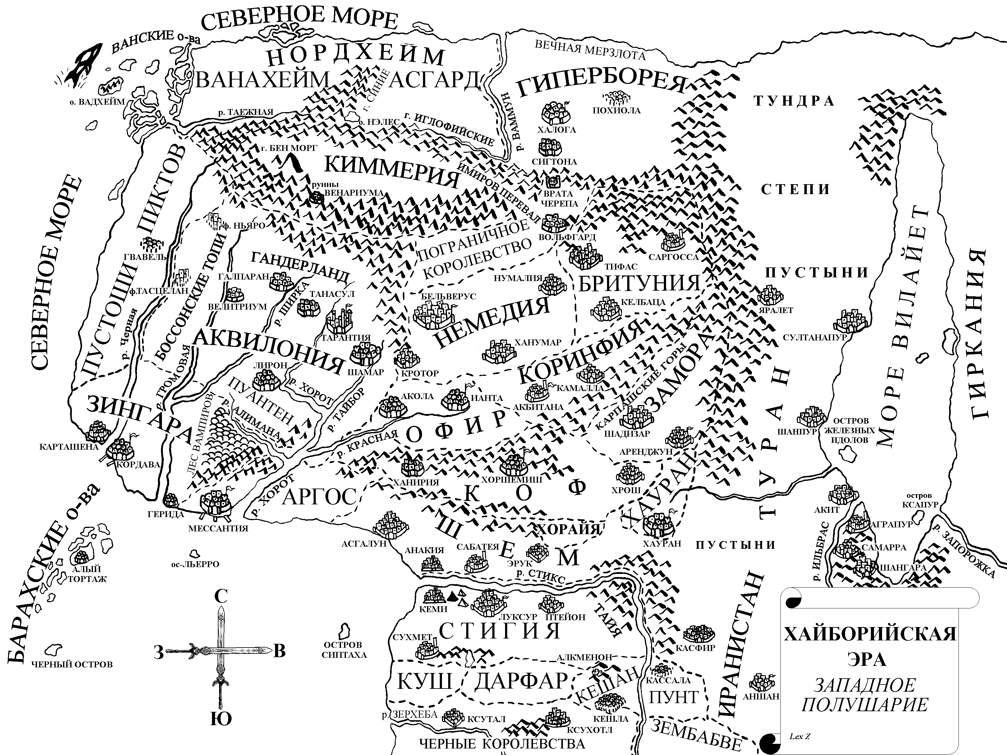 Хайборийская эра. Западное полушарие